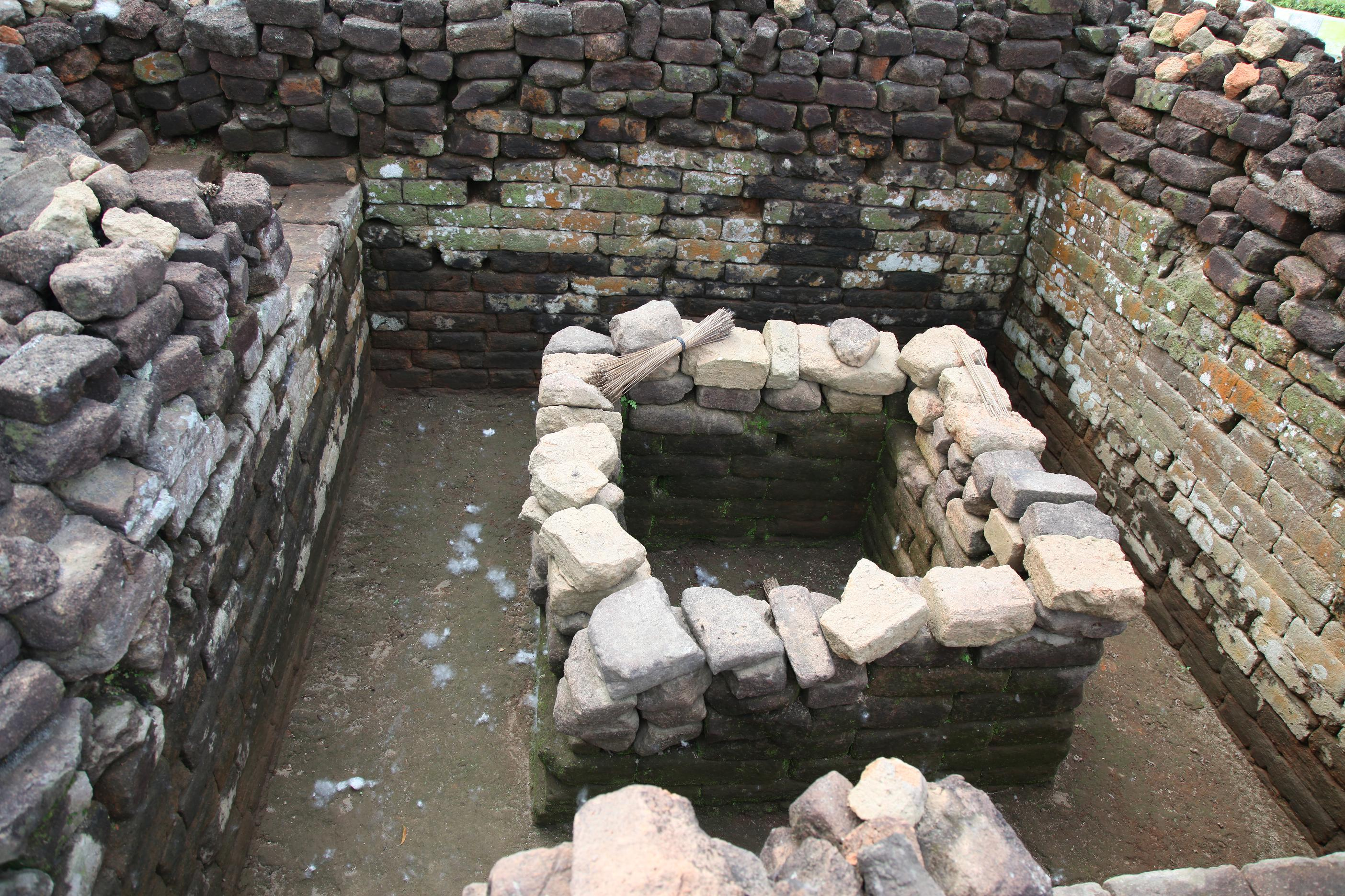 Candi Sumber Nanas (Sumber Nanas Temple)